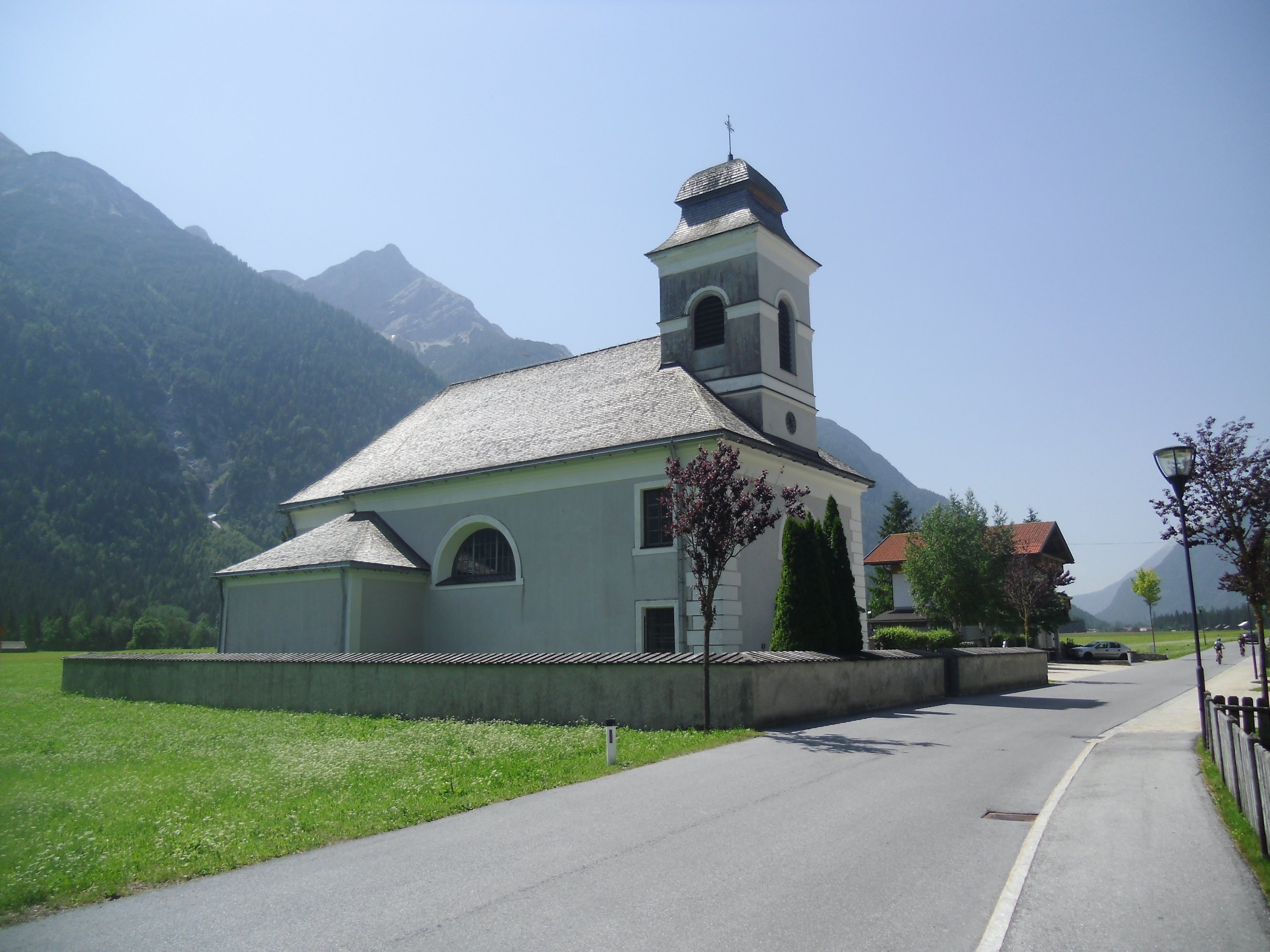 Kath. Pfarrkirche hl. Johannes der Täufer und Friedhof